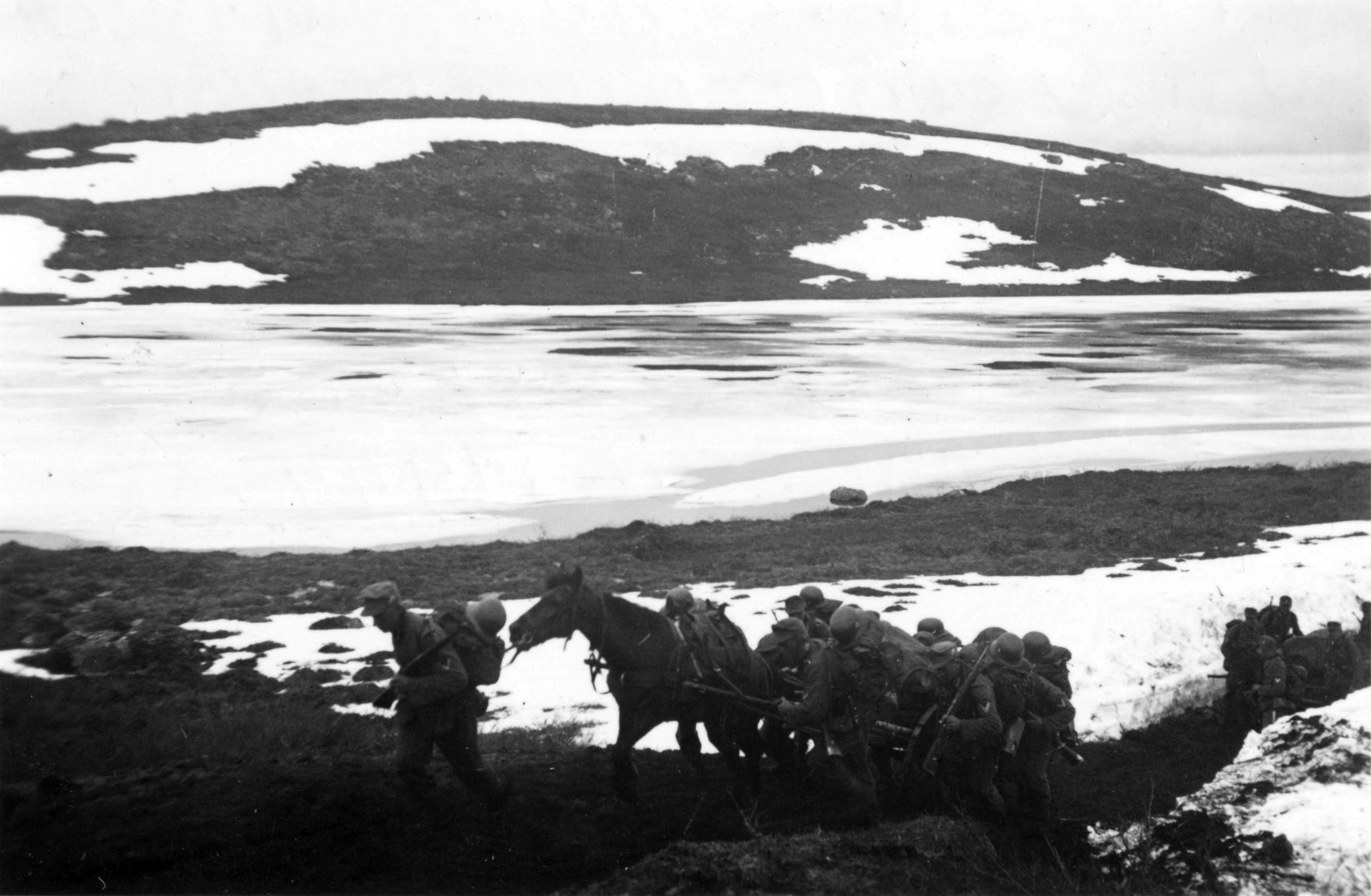 Marsjering til Titowka med hest Tittel / Title: Marsjering til Titowka med hest Dato / Date: 22. - 28.06.1941 Fotograf / Photographer: Ukjent/Unknown Utgiver / Publisher: Sted / Place: Finland Eier / Owner Institution: Arkiv i Nordland Lenke / Link: Arkiv i Nordland Arkivreferanse /Archive reference: AIN.NA143.0264 Fra Dag Skogheims Privatarkiv Tekst bak bildet: 22. - 28.06.1941: Anmarsch zum Bereitstellungsraum vor der Titowka in Finland. Vor dem pferd gefr. Köch am 29.06. 1941 gefallen. 22. - 28.06.1941: Marsjering til utplasseringsplass ved Titowka i Finland. Foran hesten, korporal Köchl som falt 29.06.1941.